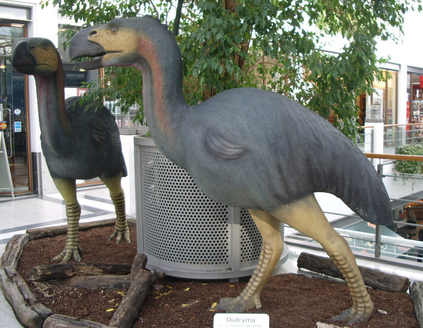 Modelle des Gastornis